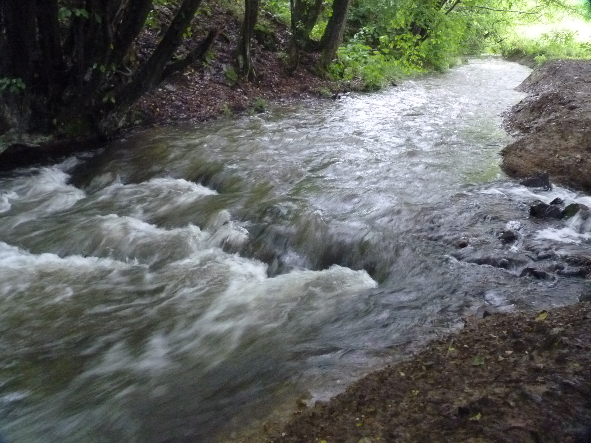 Der Geiersgrundbach bei Hochwasser, oberhalb von Hainchen